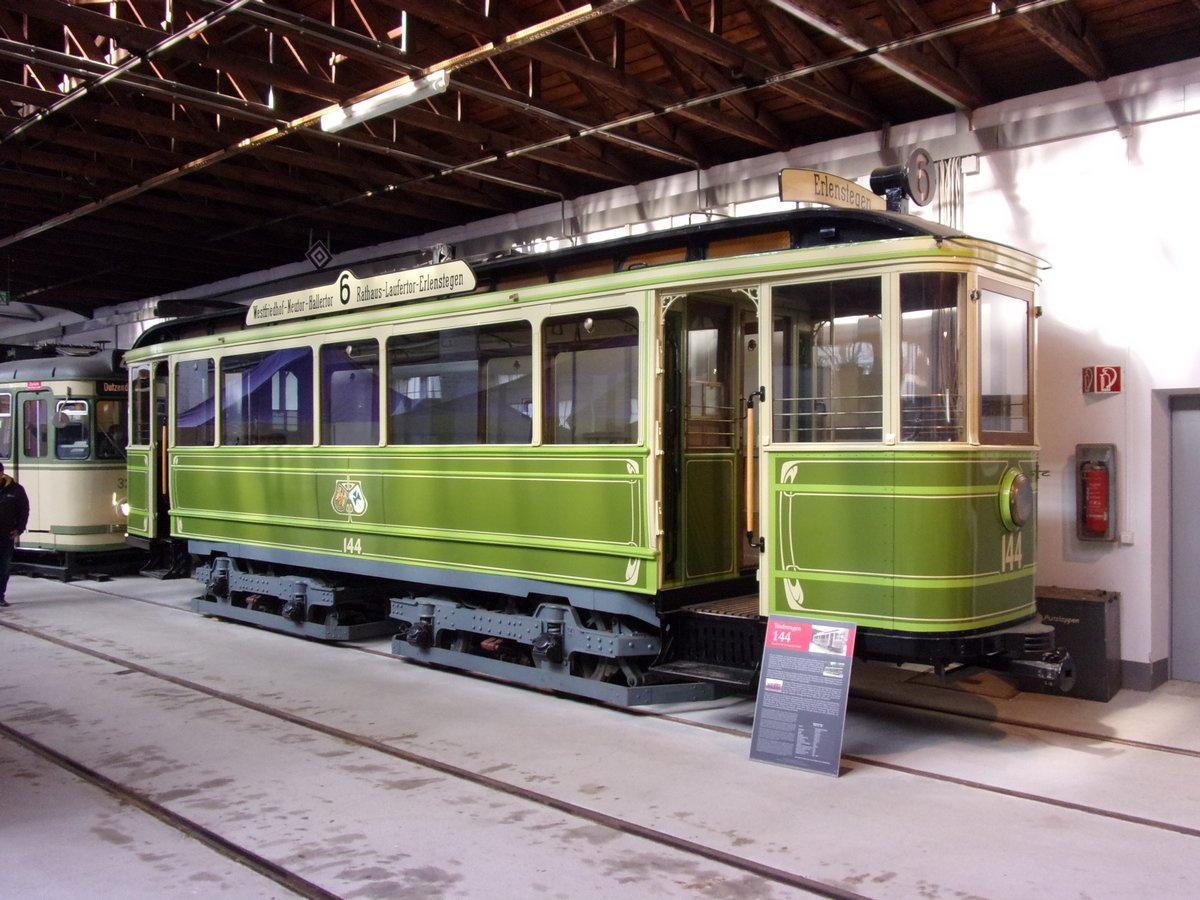 "Zeppelin"-Triebwagen Nr. 144 der Nürnberg-Fürther Straßenbahn im Historischen Straßenbahndepot St. Peter